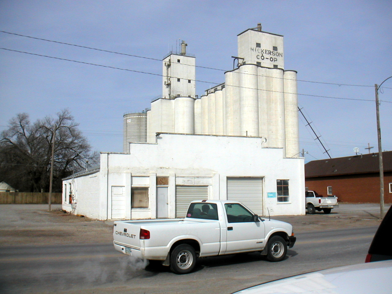 Nickerson KS, Elevator